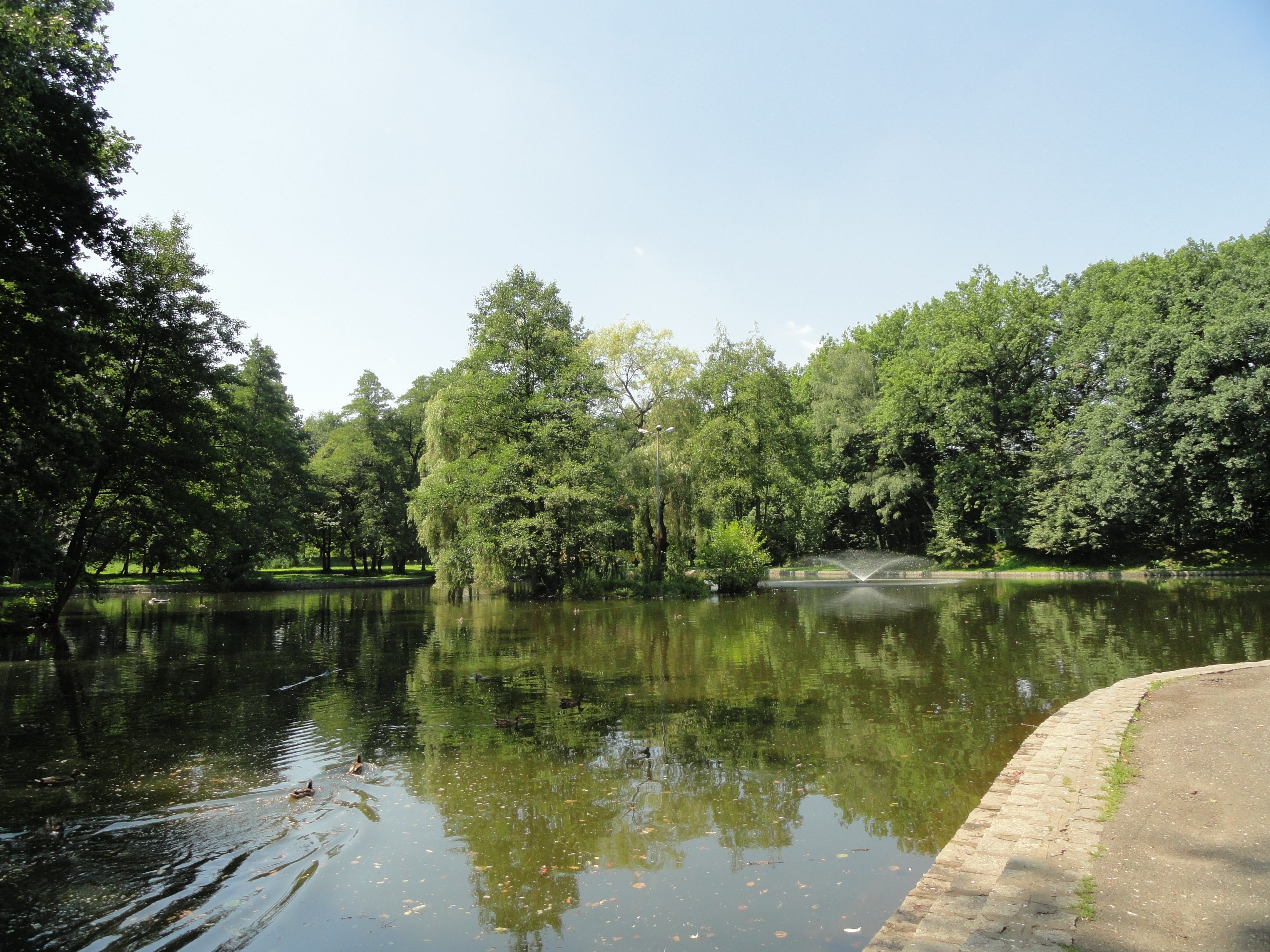 Teich im Park Andrzeja Błachańca (einst Georg-Snay-Park) in Zgorzelec